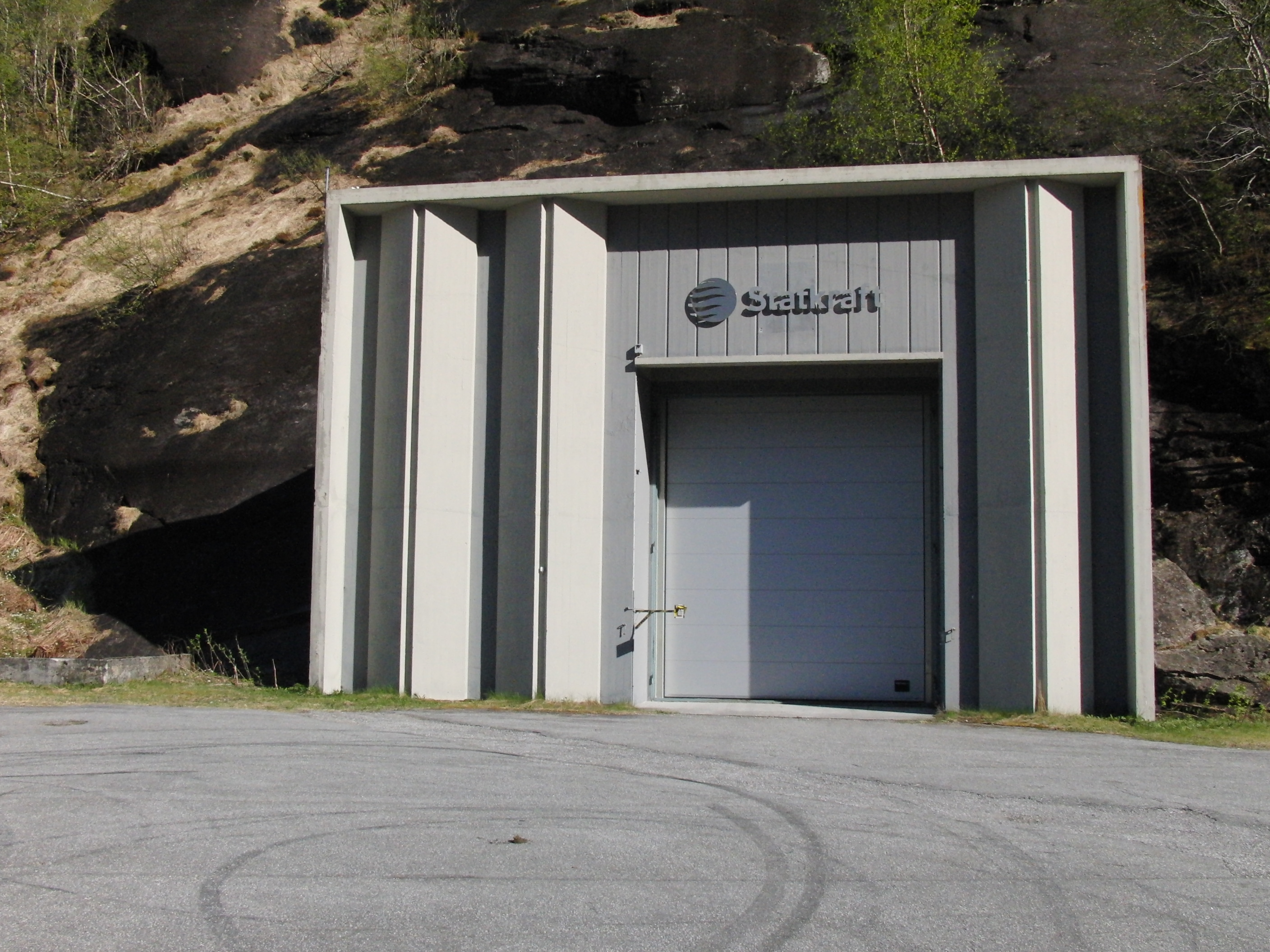 Grytten kraftverk